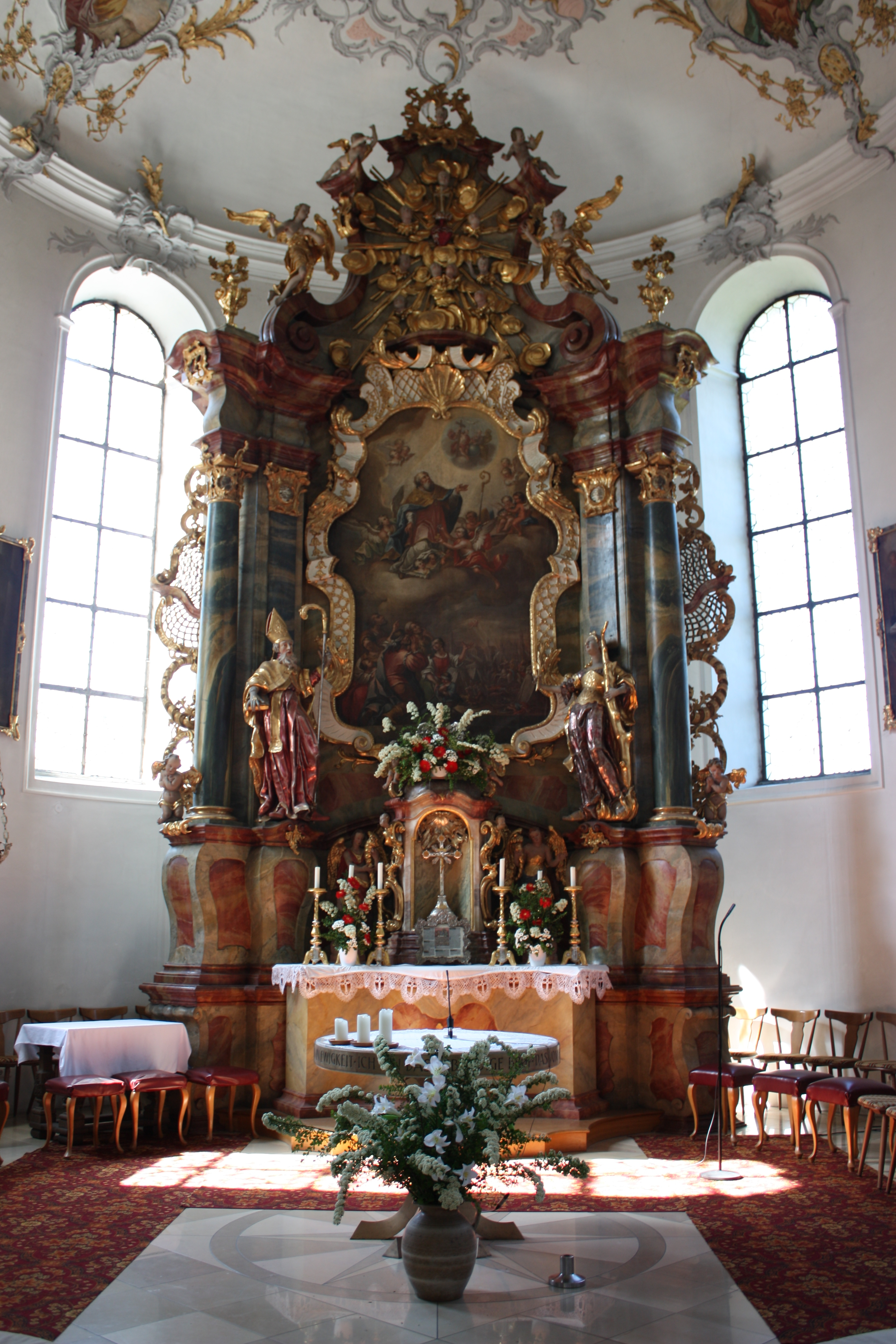 St. Ulrich (Amendingen)